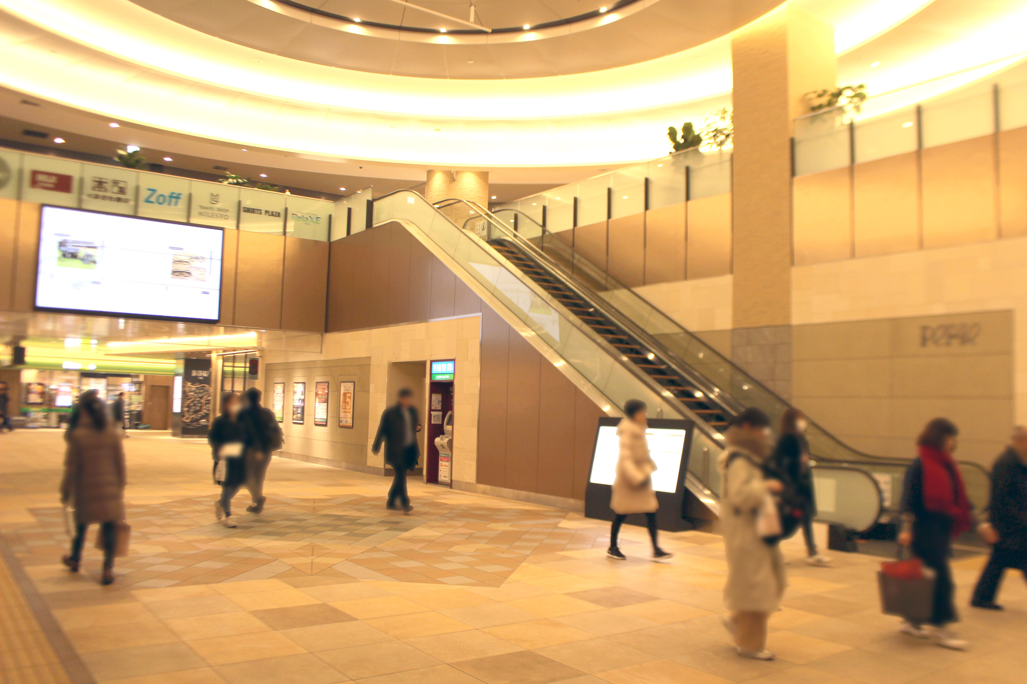 千葉駅構内 ペリエ千葉 駅ナカ施設